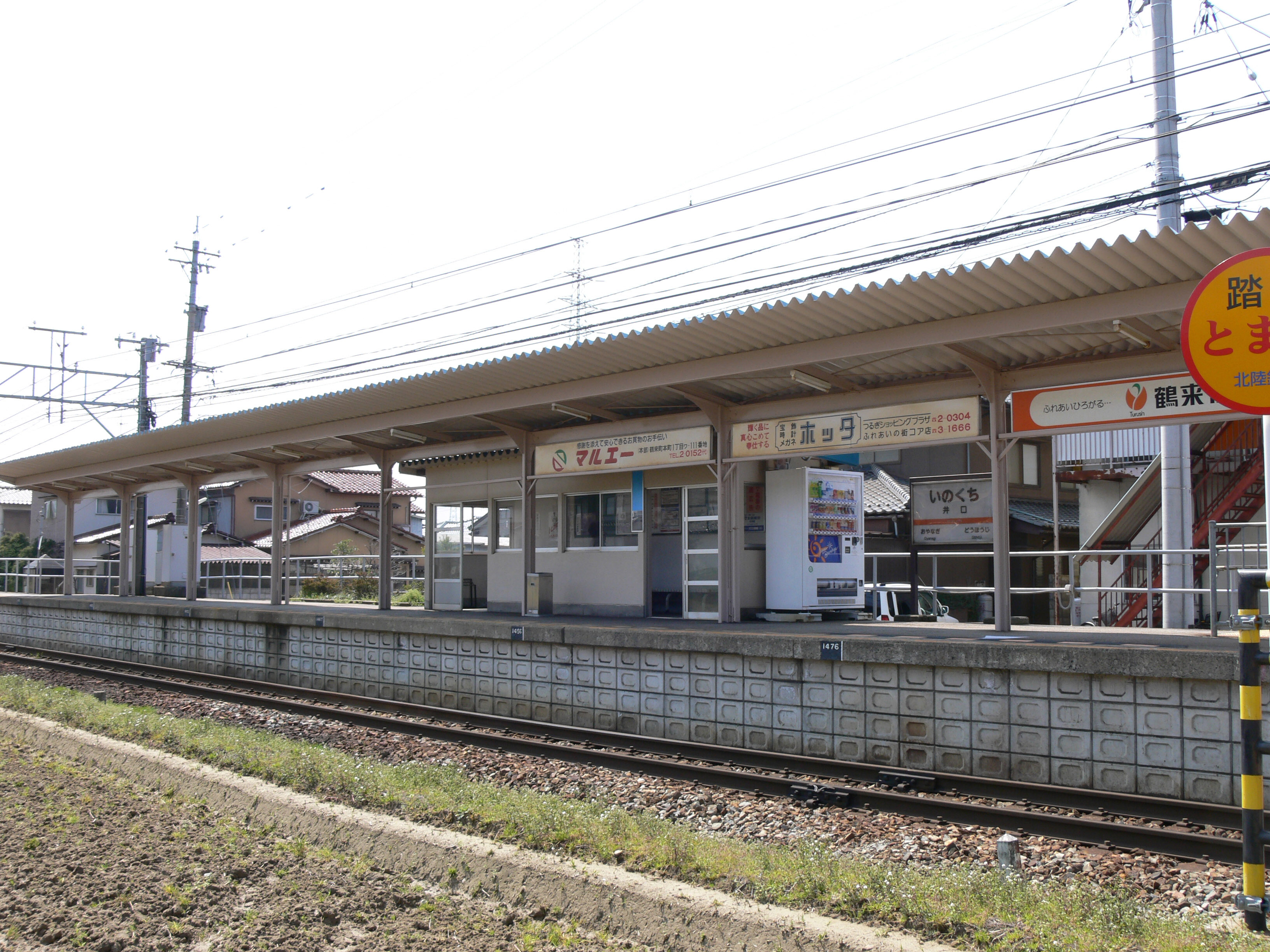 井口駅